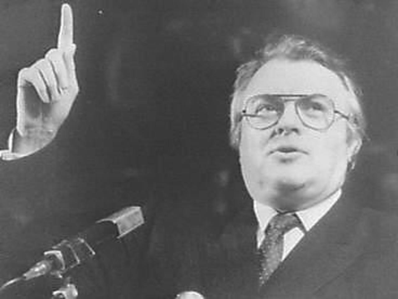 Photo de face de Pierre Mauroy prise le 21 mai 1981